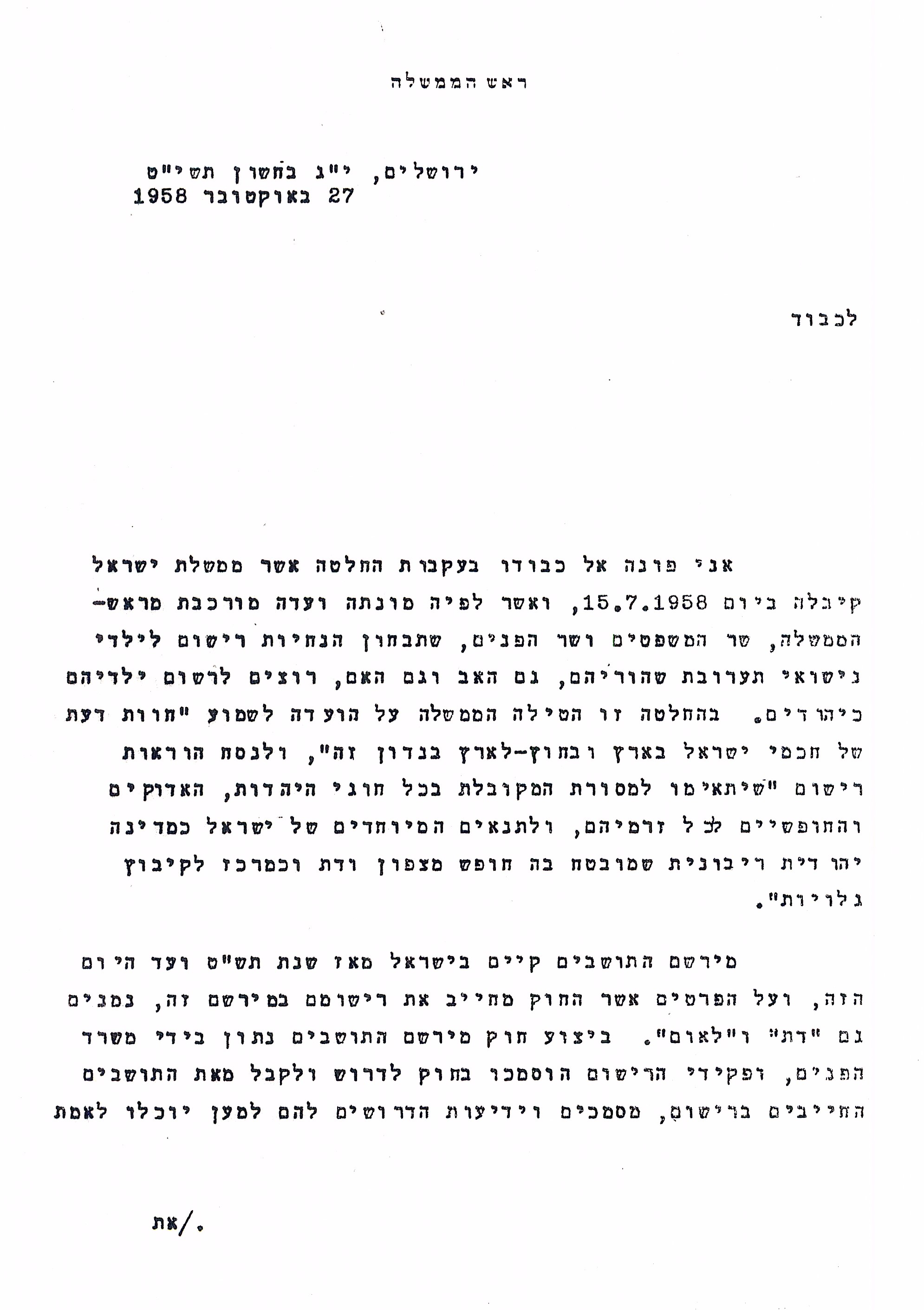 פניית רה"מ בן גוריון אל חכמי ישראל